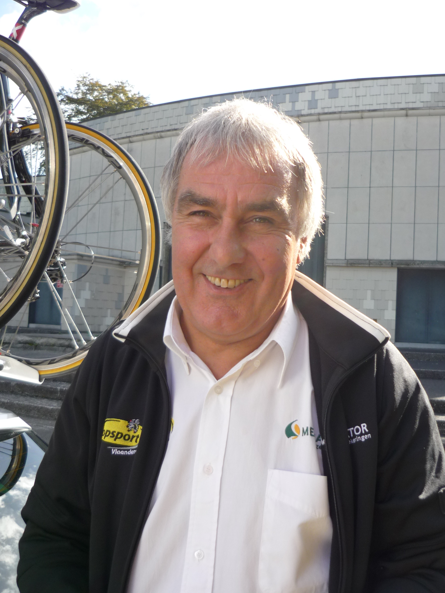 walter avant une course cycliste